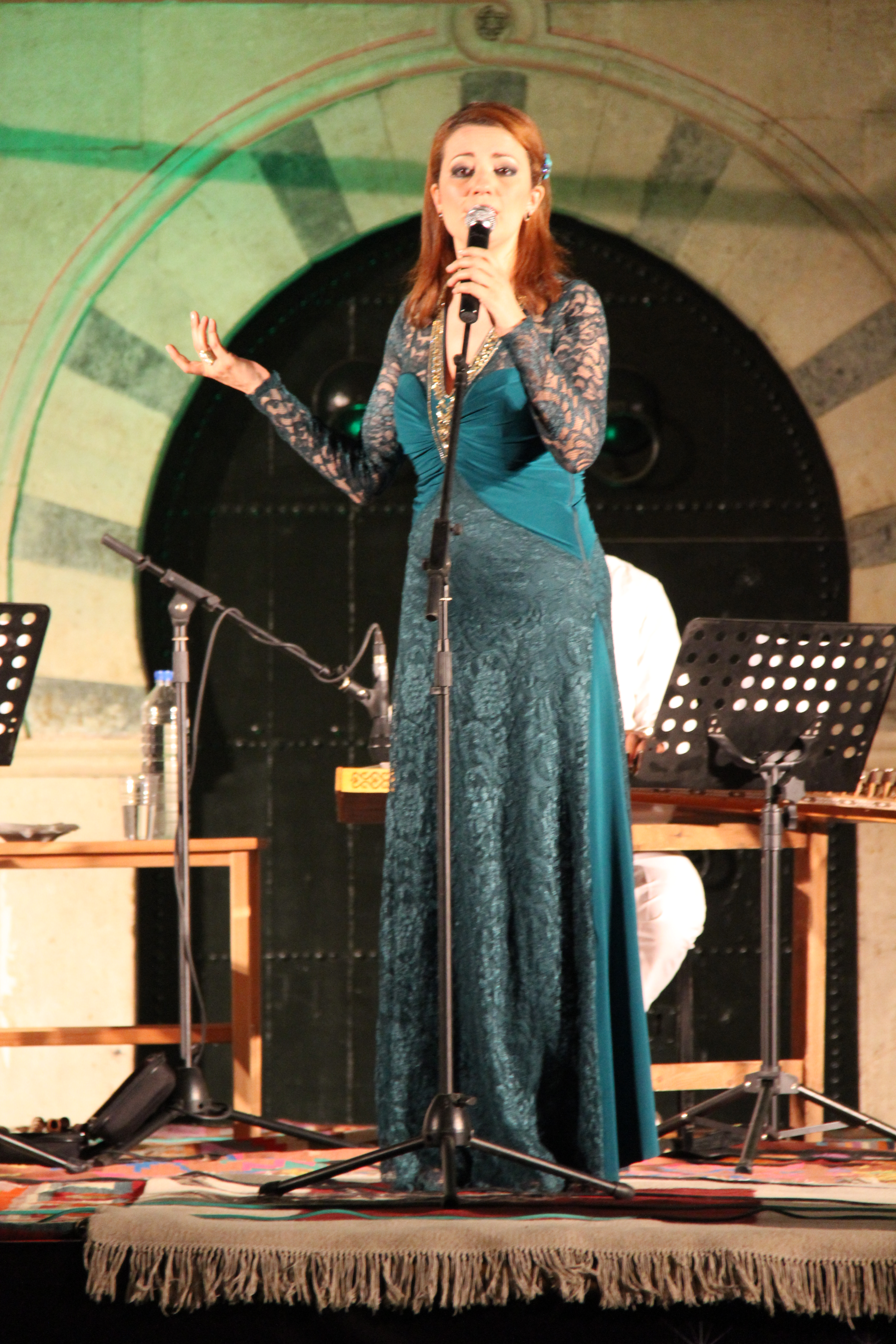 Dorsaf Hamdani - Princesses du Chant Arabe - Palais El Abdellia - La Marsa